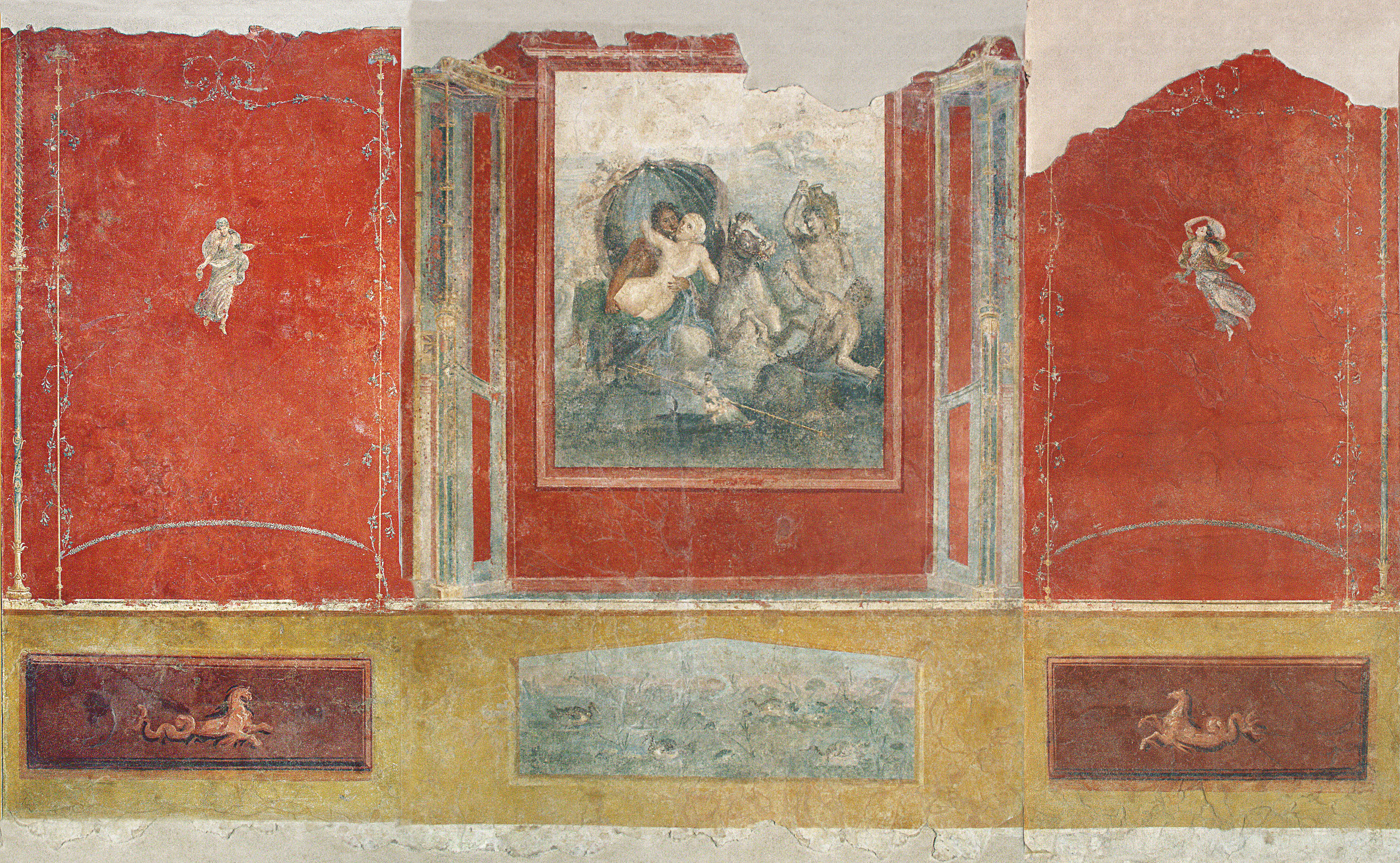 Affresco di Nettuno e Amimone, proveniente da Villa Carmiano, conservato all'Antiquarium stabiano